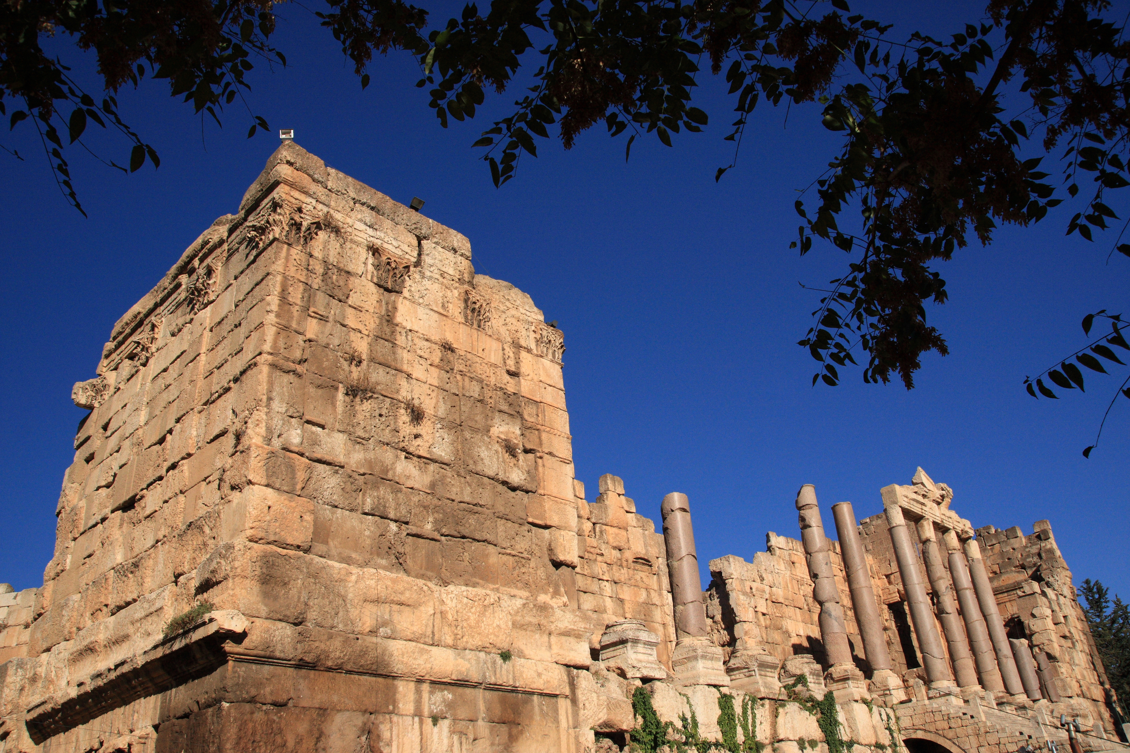 Baalbek